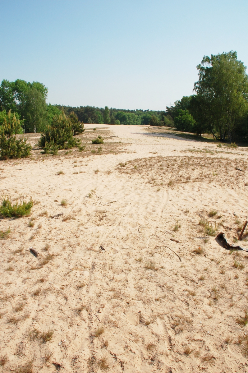 Standortübungsplatz Speyer / Dudenhofen, Rheinland-Pfalz, Deutschland